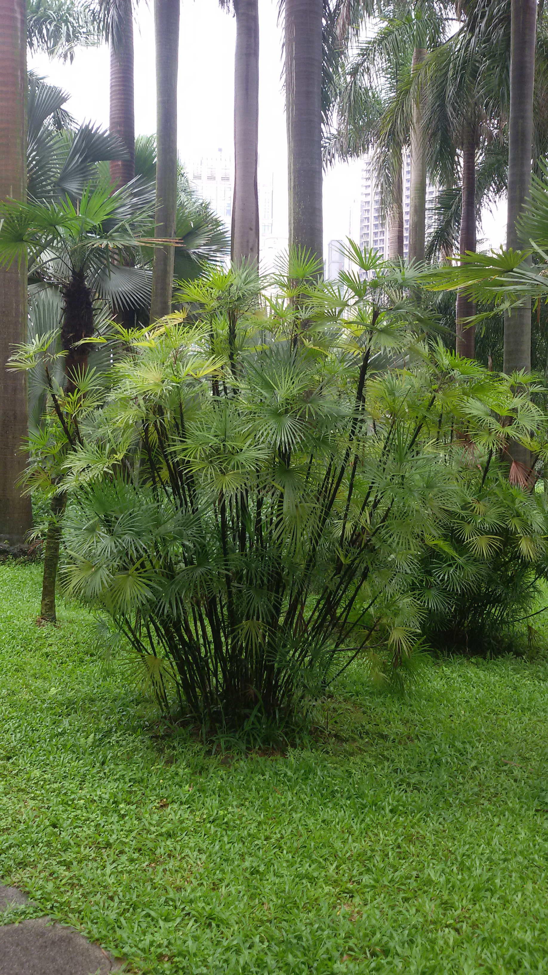 粵語: 喺廣州珠江公園入面種嘅金山棕